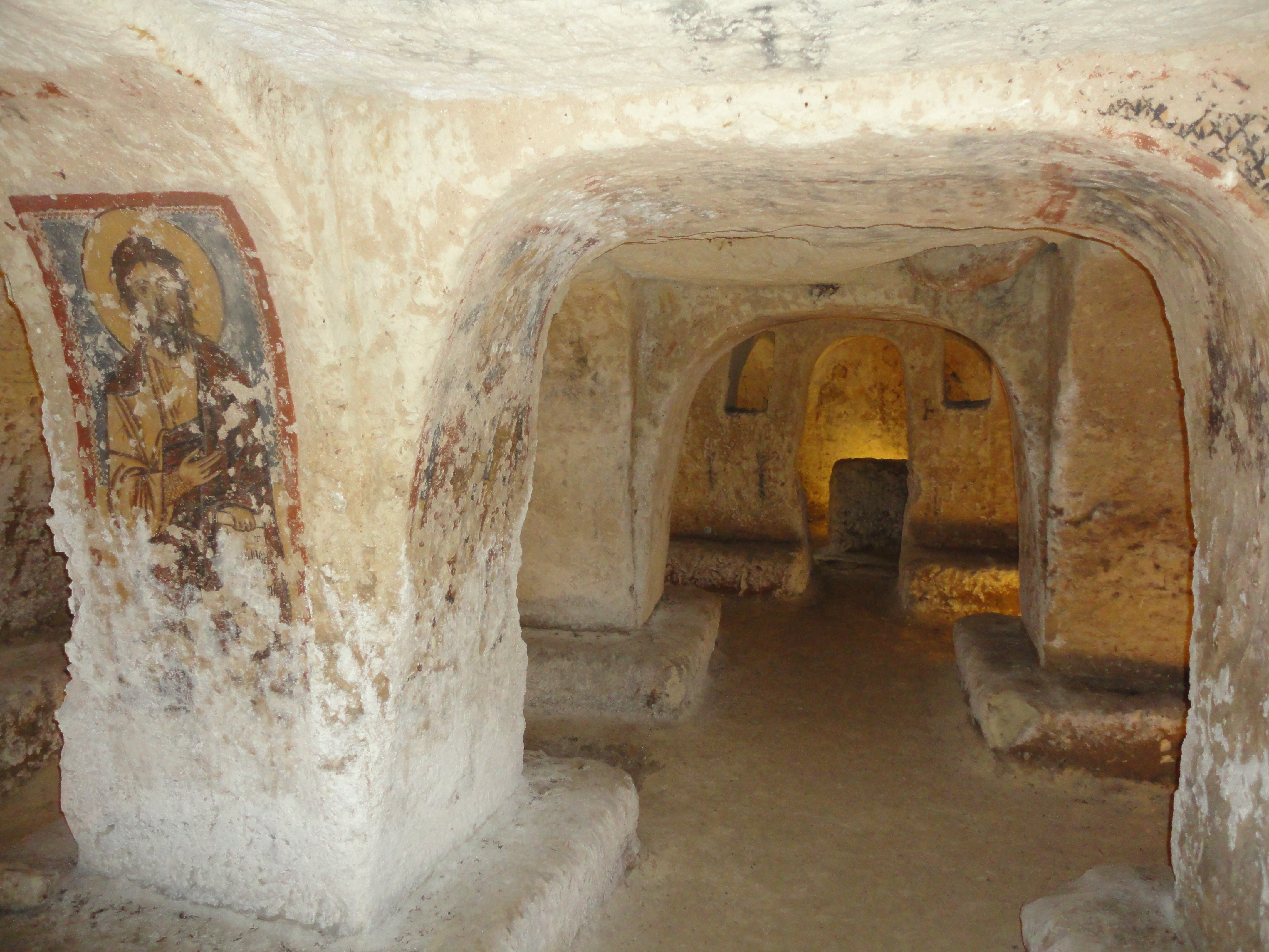 Cripta dell'Assunta Sanarica, Lecce